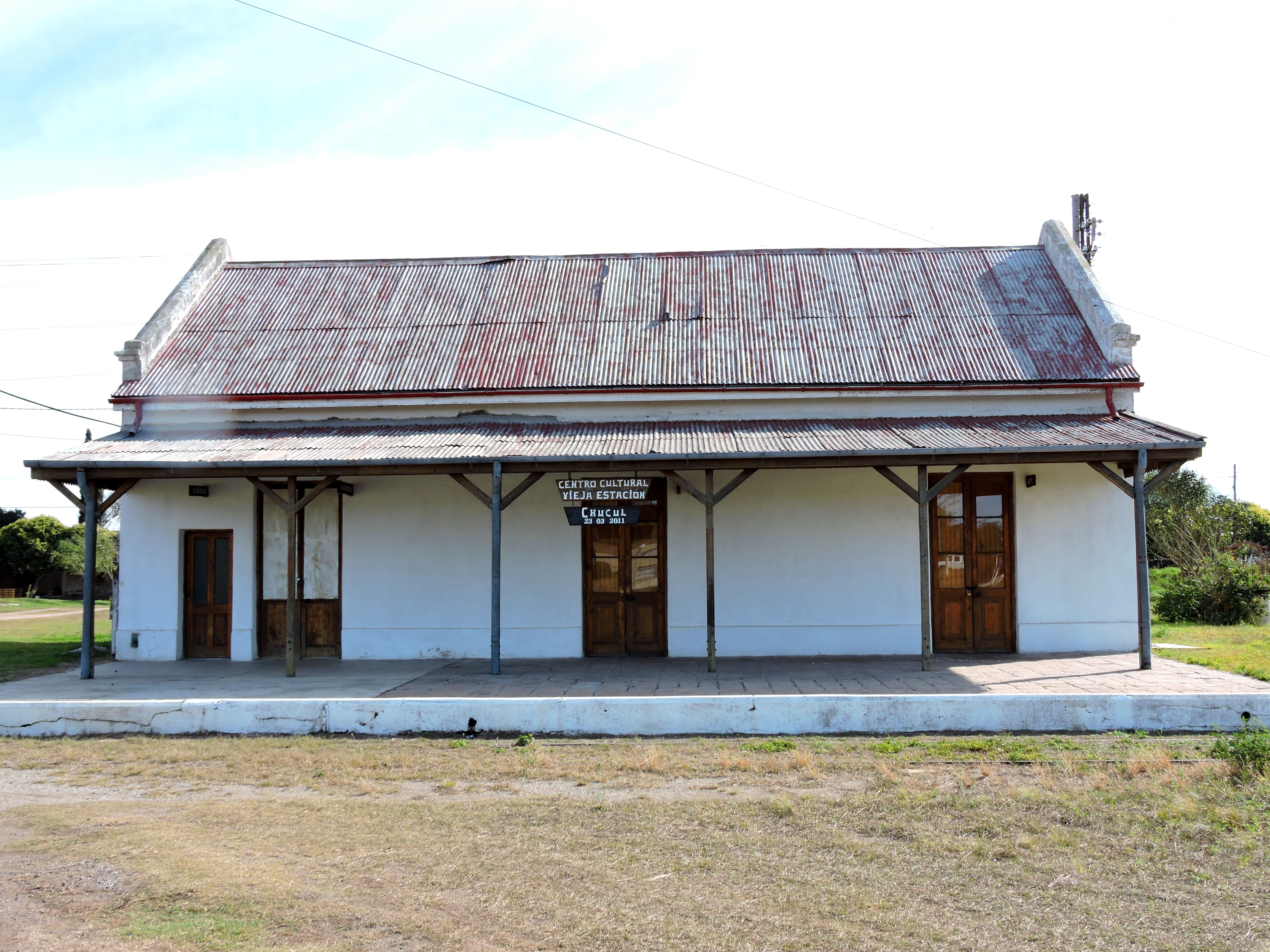 Edificio de la vieja Estación Chucul. Hoy es un centro cultural.